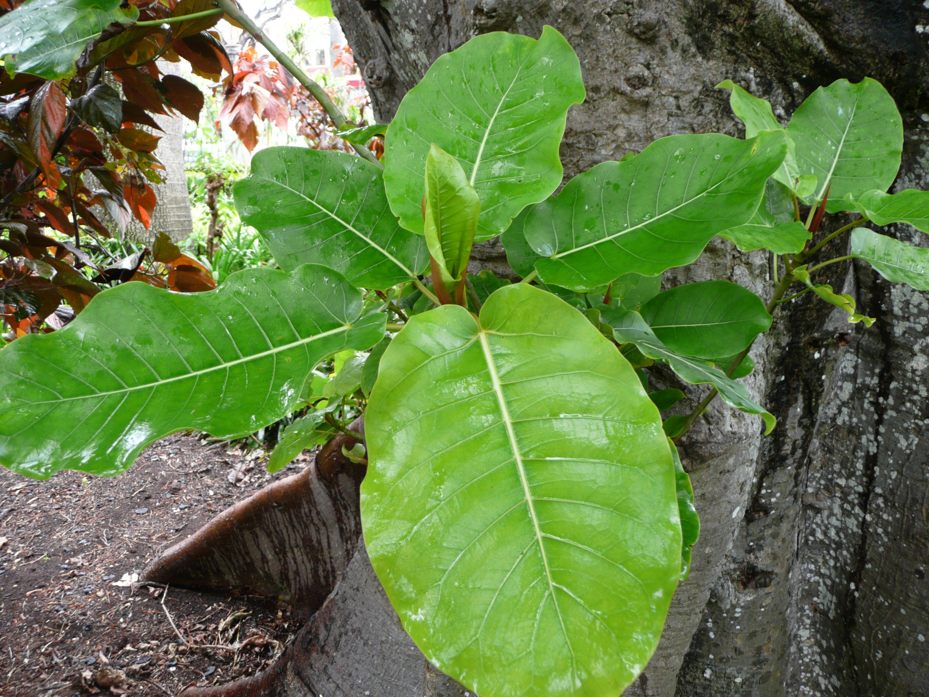 Ficus nymphaeifolia in Jardín de Aclimatación de la Orotava Map: 28° 24' 39" N, 16° 32' 7" W